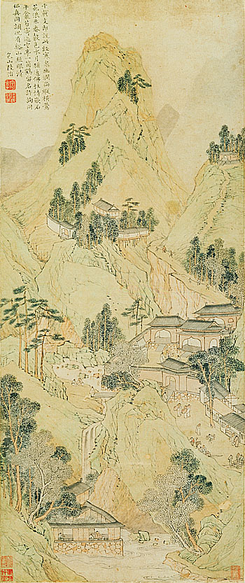 中文（中国大陆）: 陆治《支硎山图》，现藏于台北故宫博物院。